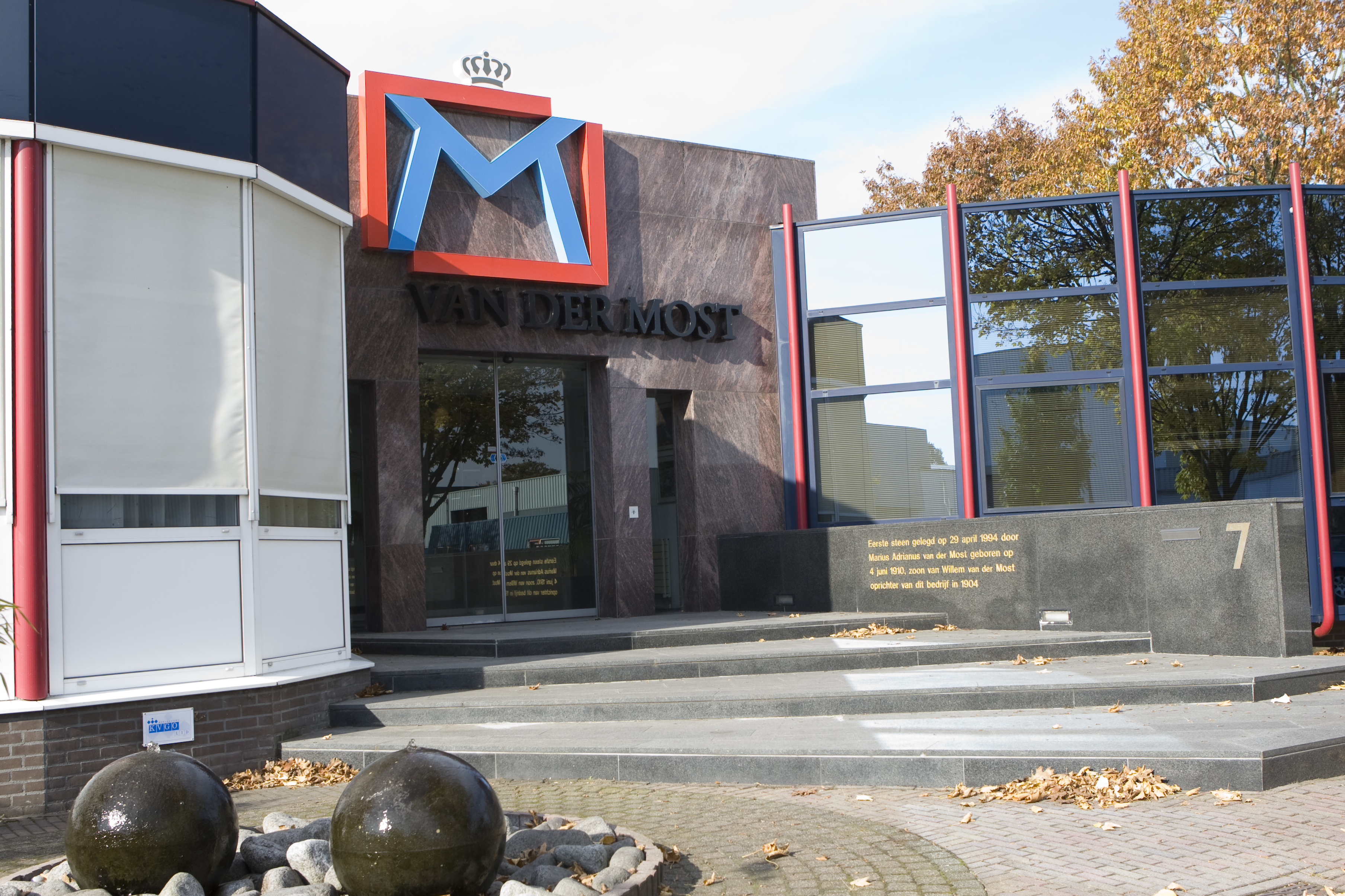 Hoofdingang van Koninklijke Van der Most, Europaweg 7 in Heerde.